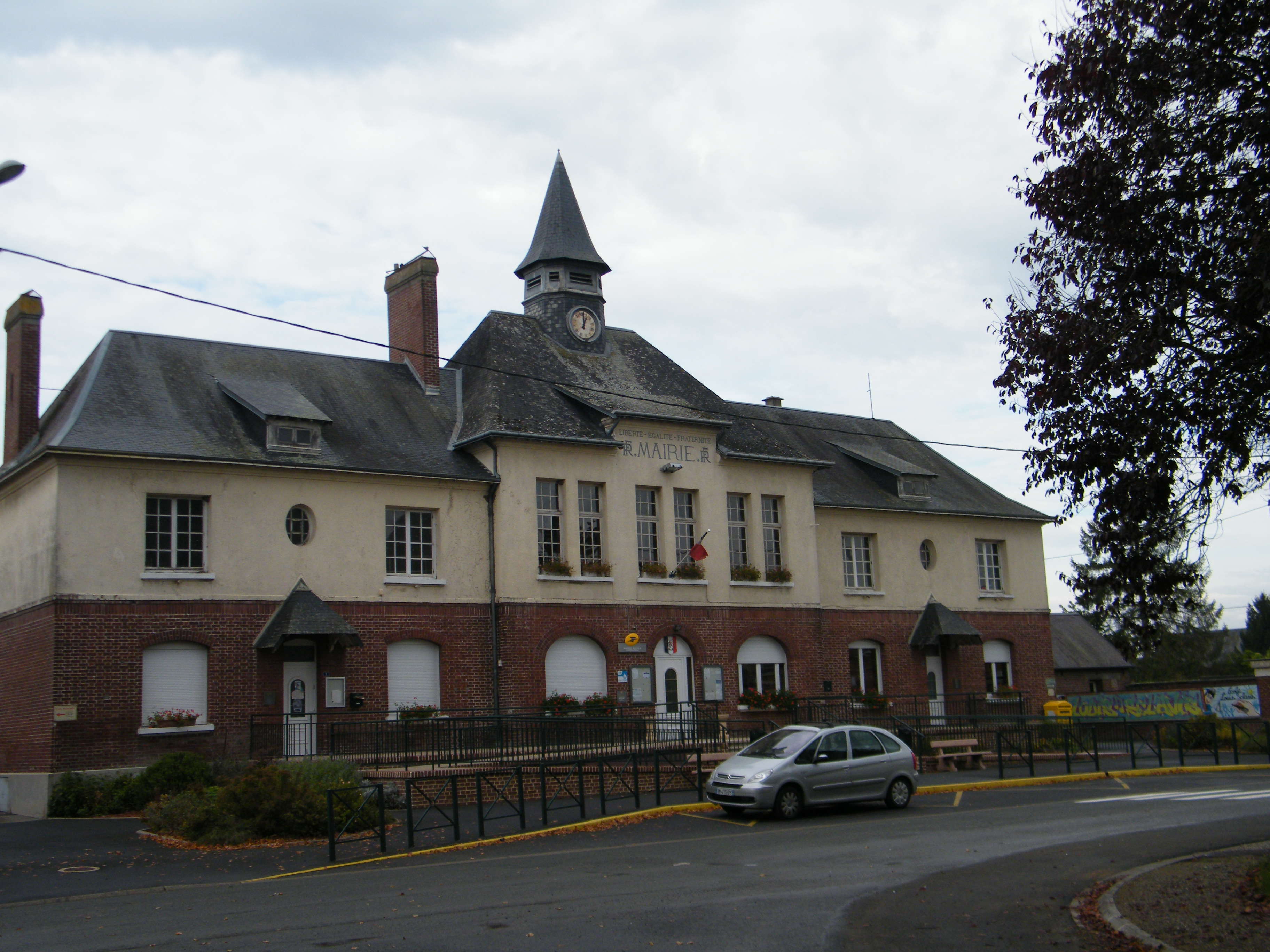 Mairie de Hombleux, Somme, France.